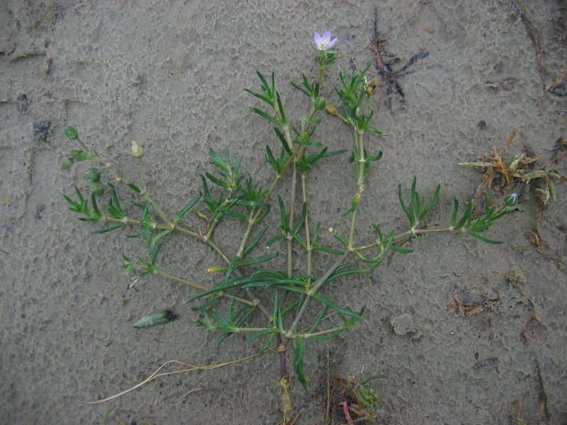 Flügelsamige Schuppenmiere Spergularia media, Wismarbucht